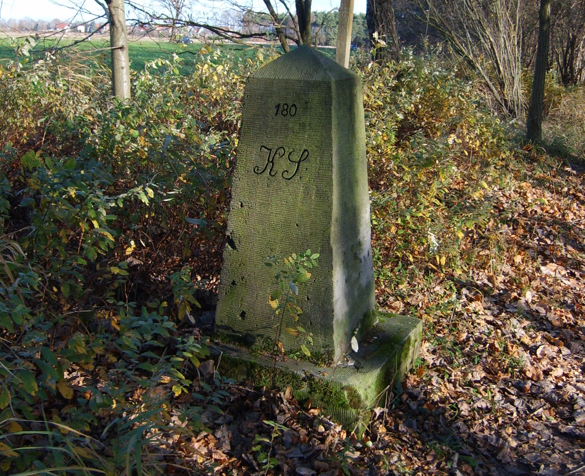 Sächsisch-Preußischer Grenzstein Nr. 180 am Elsterwerda-Grödel-Floßkanal zwischen Prösen und Gröditz.